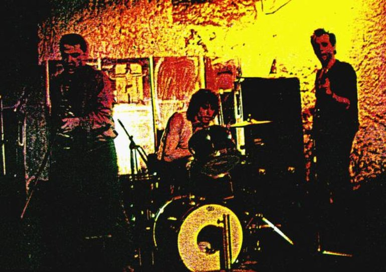 16-17_Erste_Besetzung